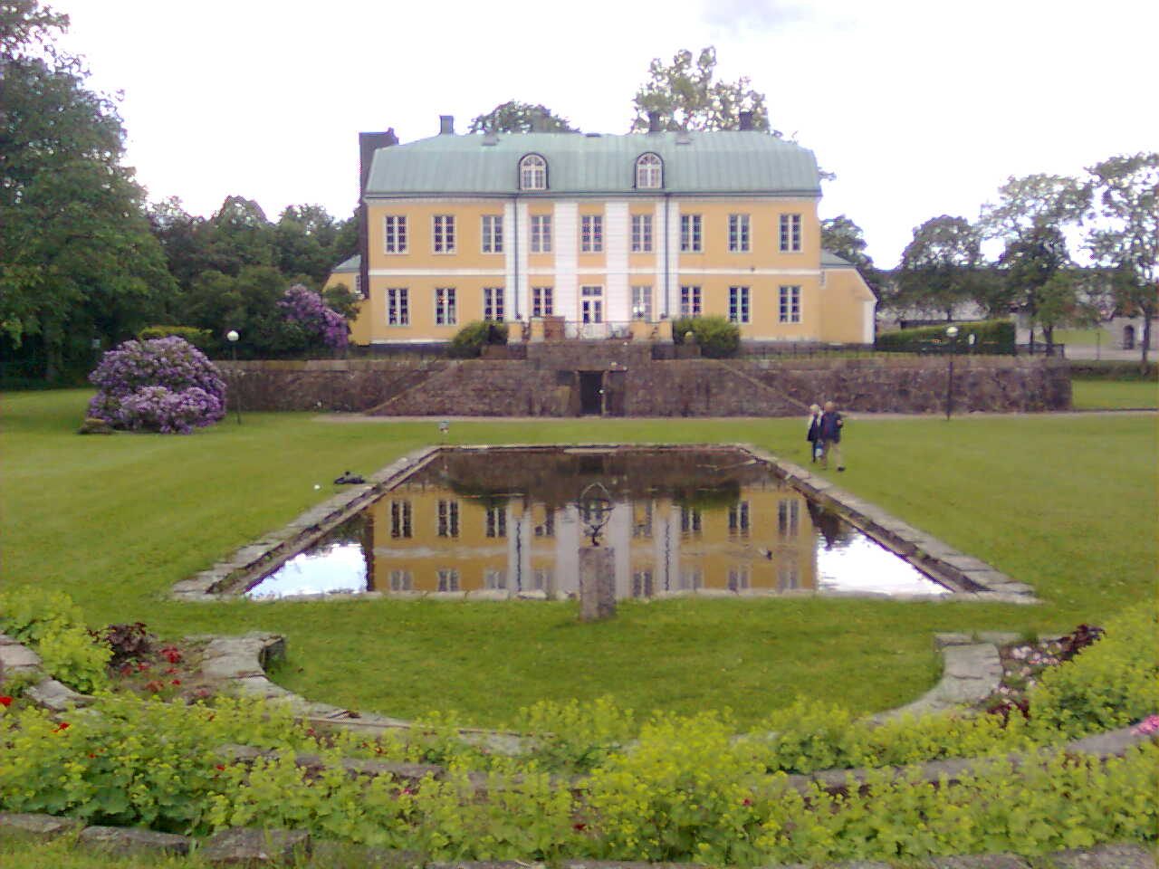 Vapnö slott sett från slottsparken.